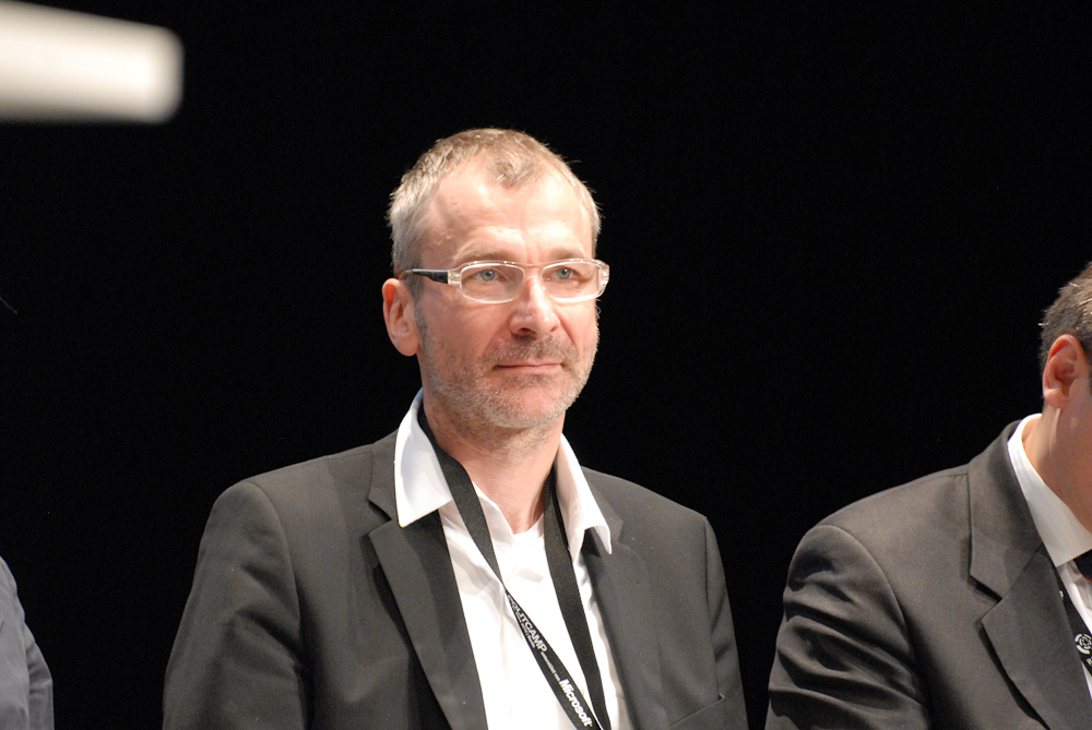 Volker Beck, German politician